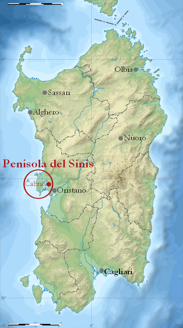 Sinis - Sardinia